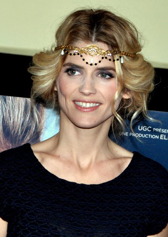 Alice Taglioni à l'avant-première de "Cookie"